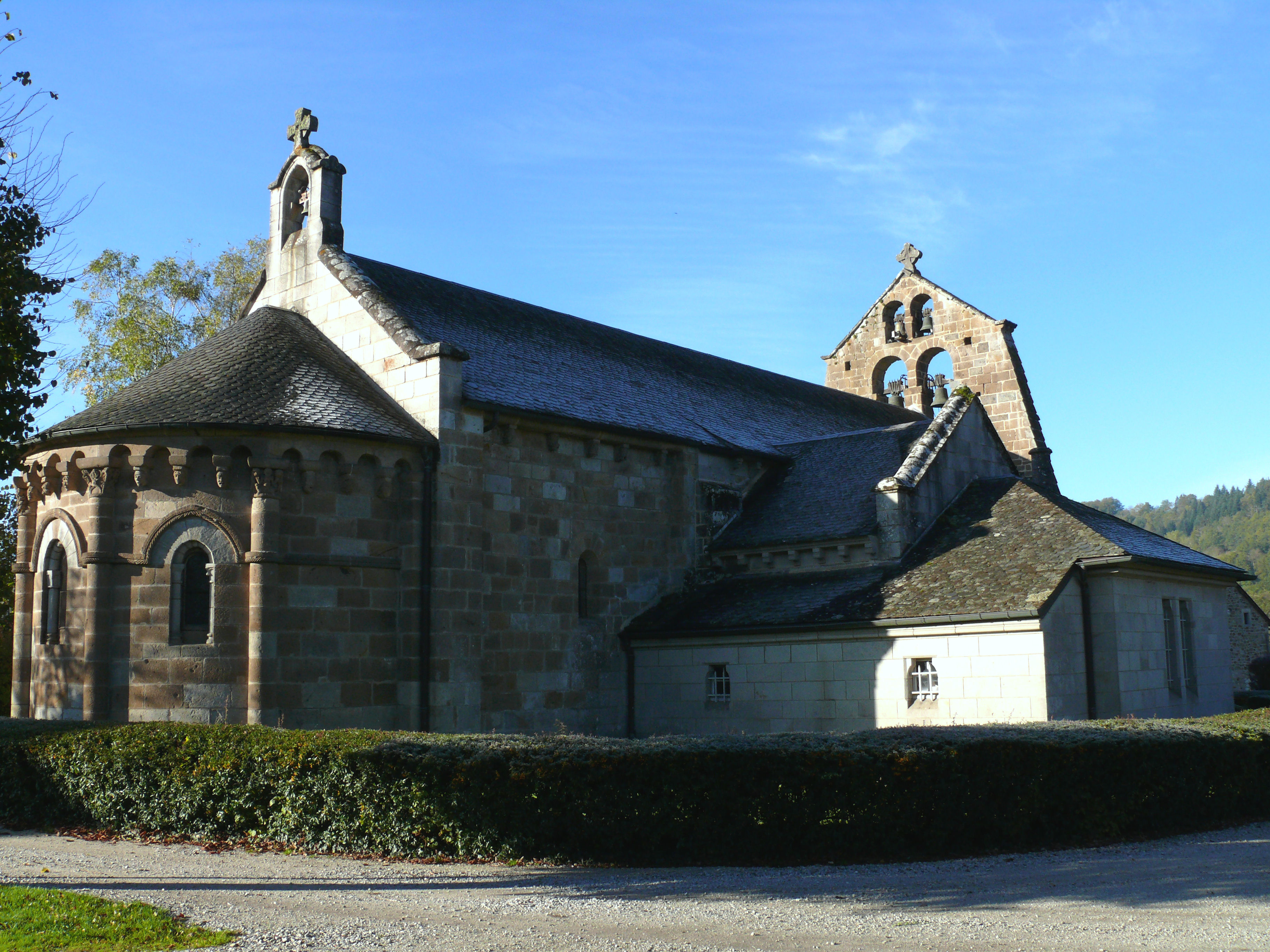 Ydes-Bourg - Eglise Saint-Georges